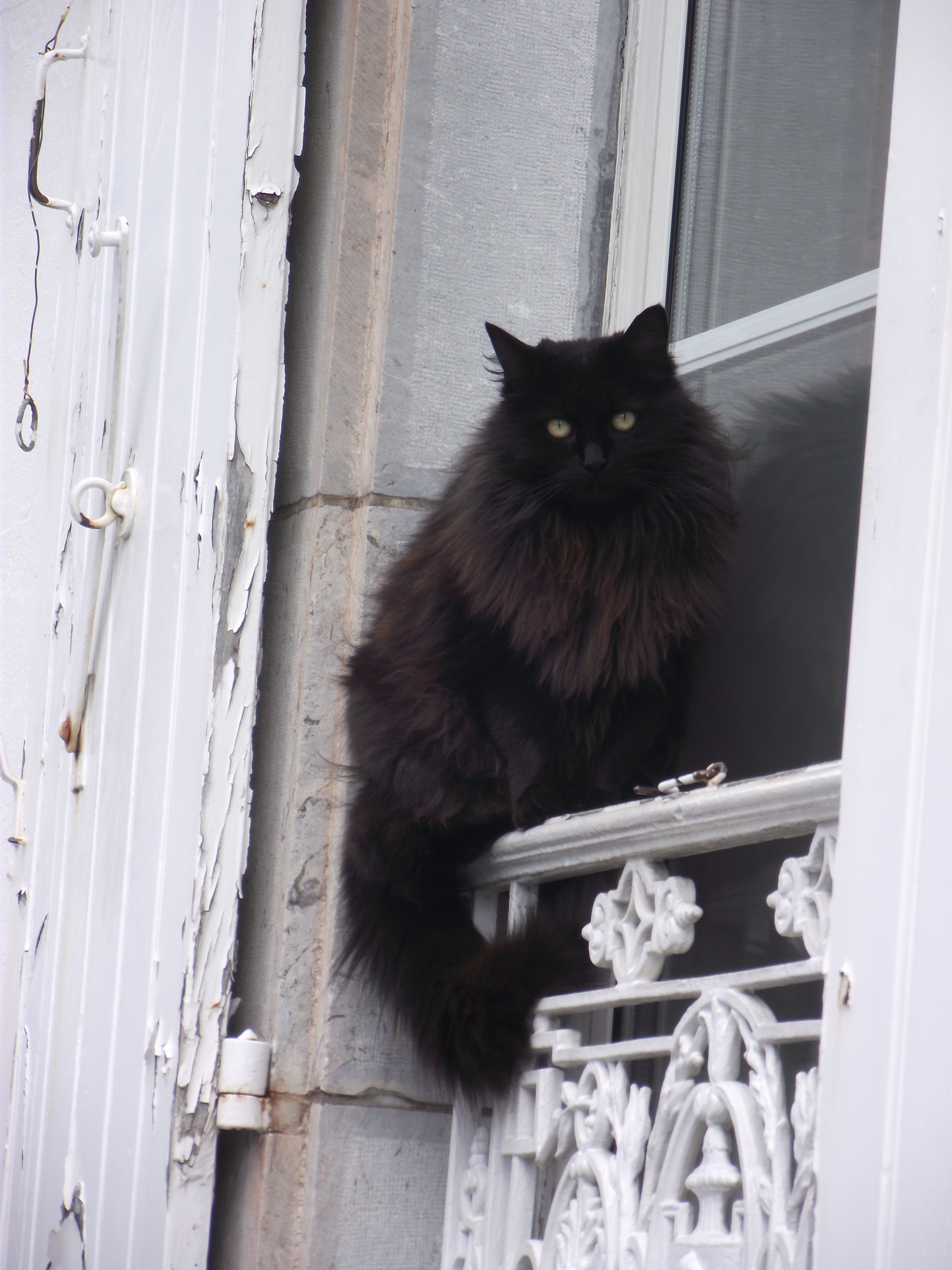 Chat angora noir